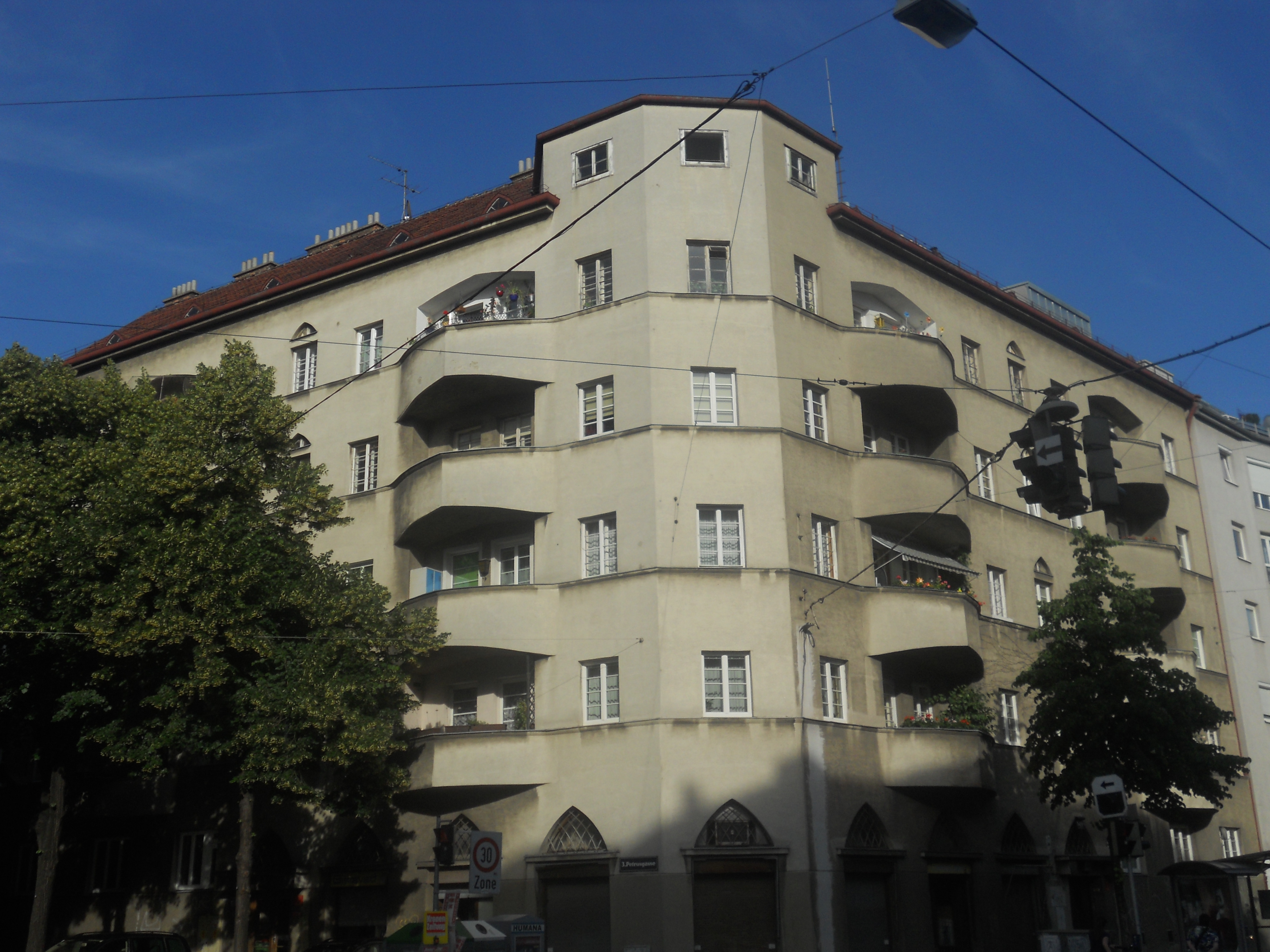 Der Gemeindebau Landstraßer Hauptstraße 149 ("Marianne-Hainisch-Hof")